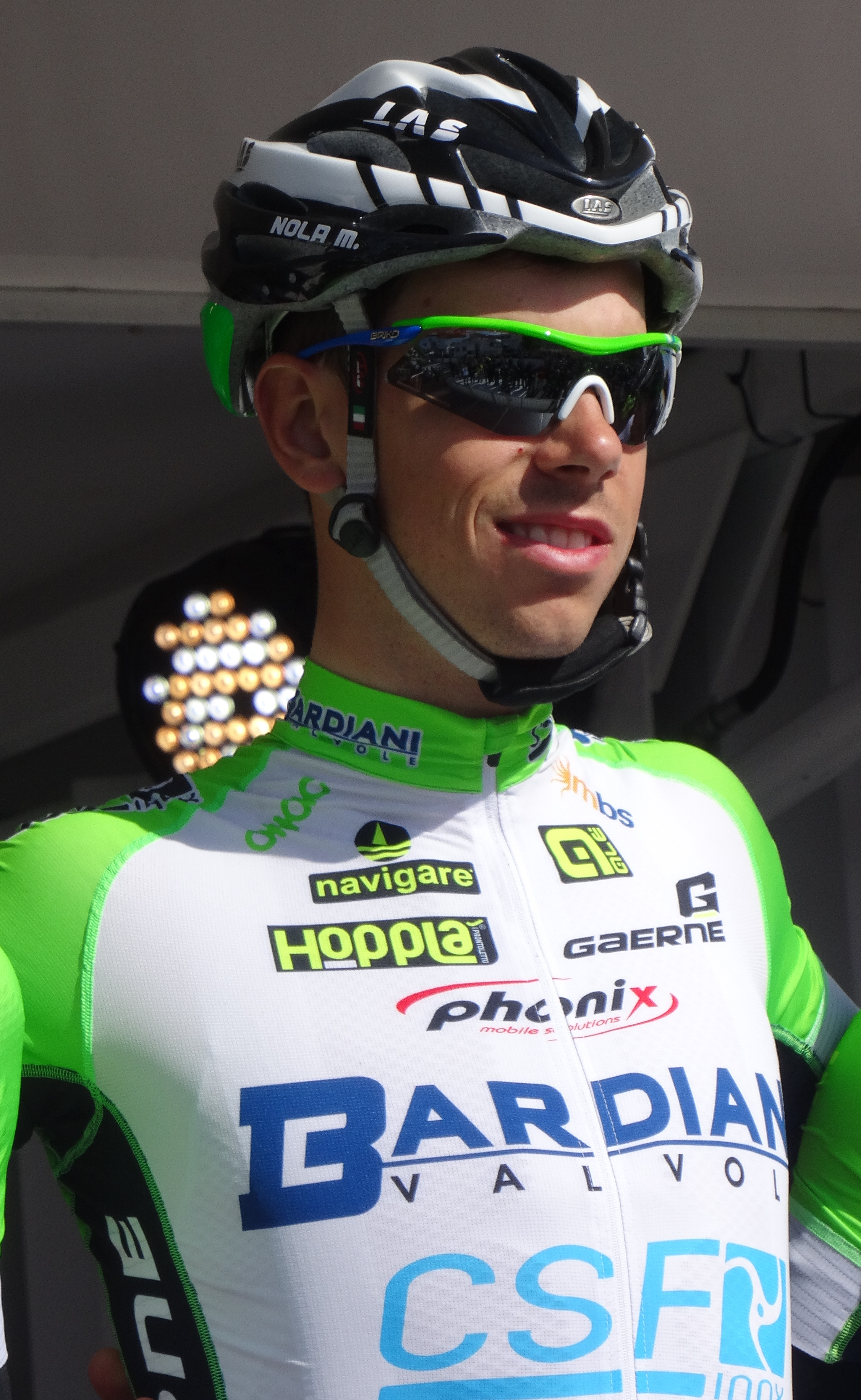 Reportage réalisé le jeudi 17 avril à l'occasion du départ et de l'arrivée du Grand Prix de Denain 2014 à Denain, Nord, Nord-Pas-de-Calais, France.